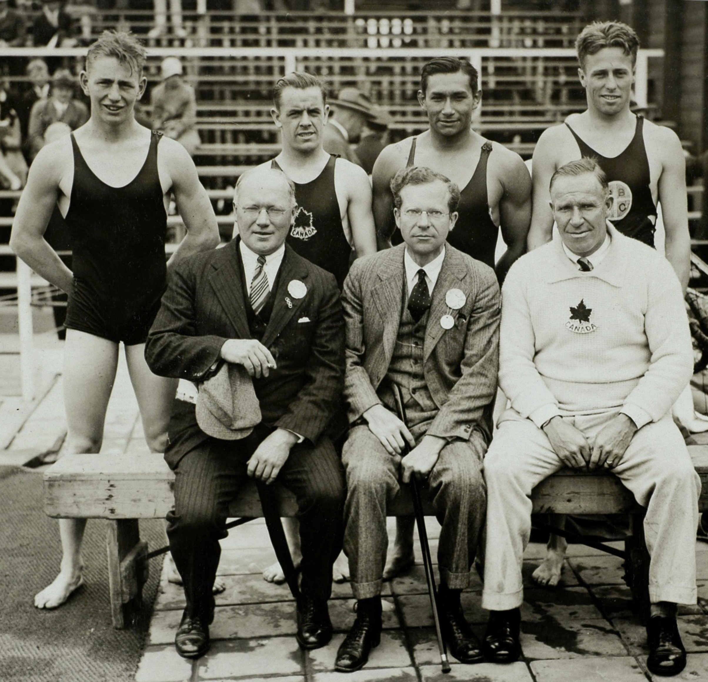 Sport. Olympische Spelen Amsterdam 1928. Zwemmen, heren : De Canadese zwemploeg voor de 4x200 m poseert achter een aantal hoogwaardigheidsbekleders. L-r: Munroe Bourne, James Thompson, Walter Spence, Garnet Ault.